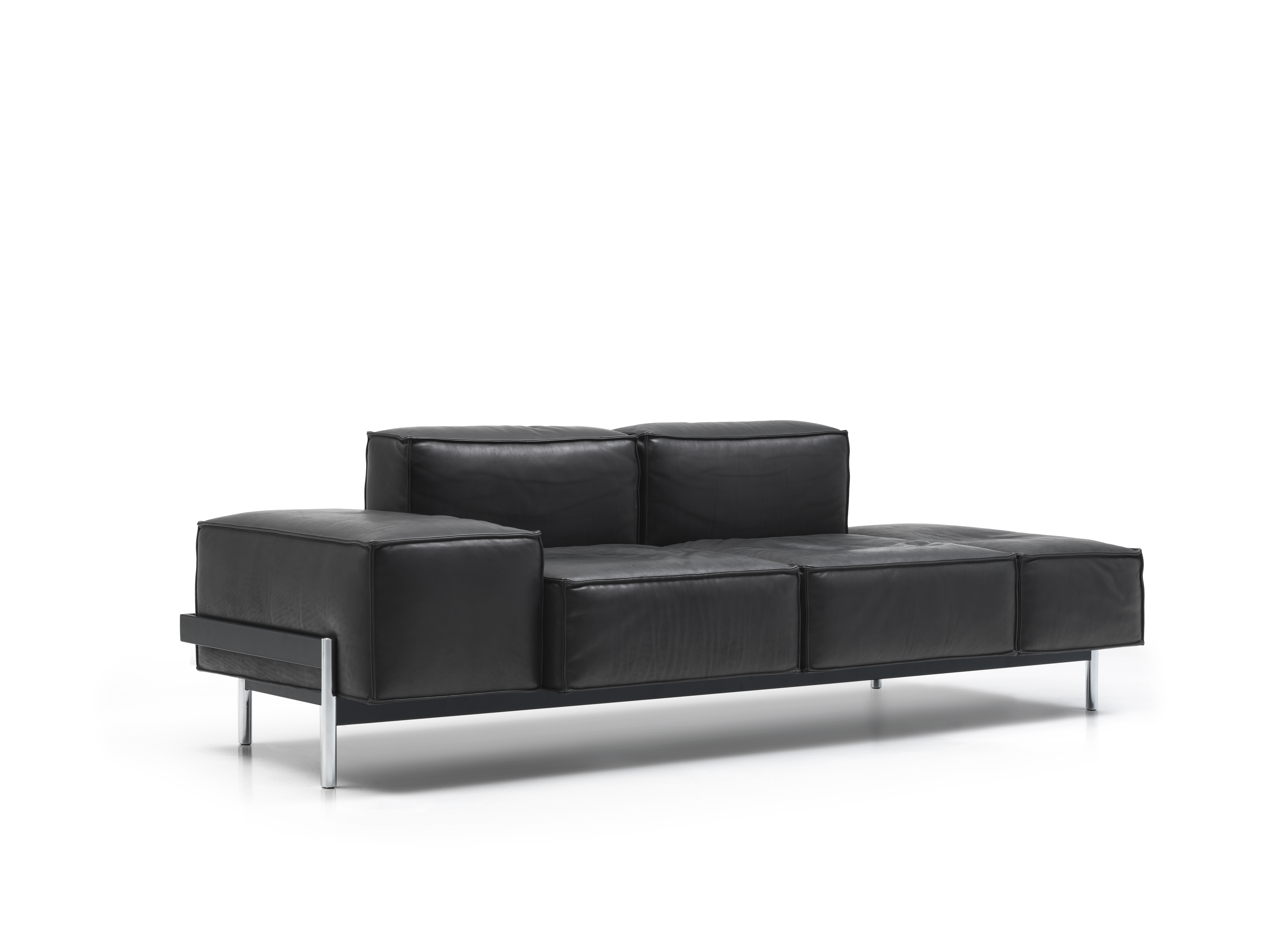 DS-21 Sofa designed von Stephan Hürlemann